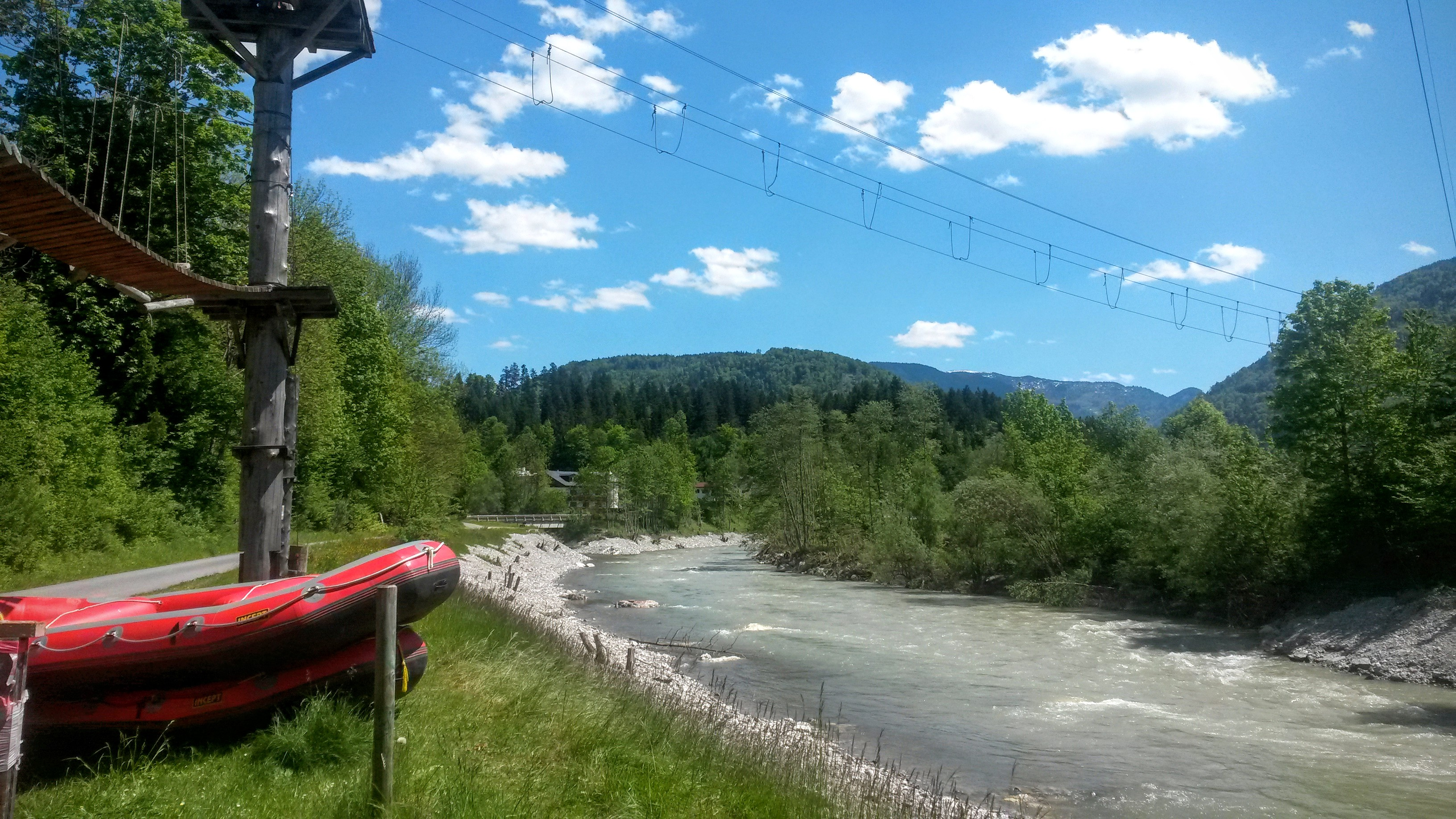 Die Großache bei Kössen im Kaiserwinkl